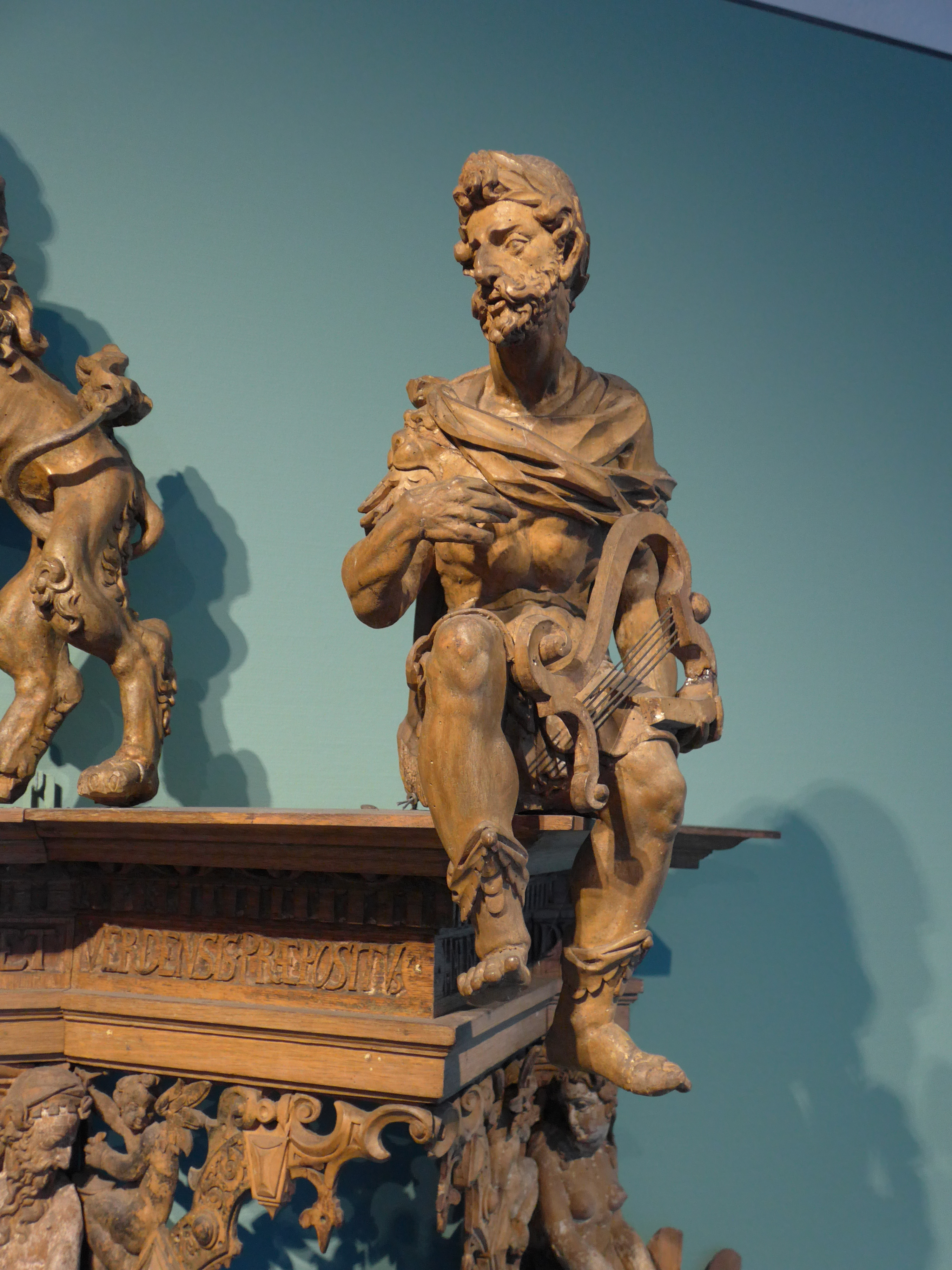 König David vom Rotenburger Orgelprospekt, Ludwig Münstermann, 1608. Focke-Museum Bremen, Inv. Nr. 09004 (Detail)